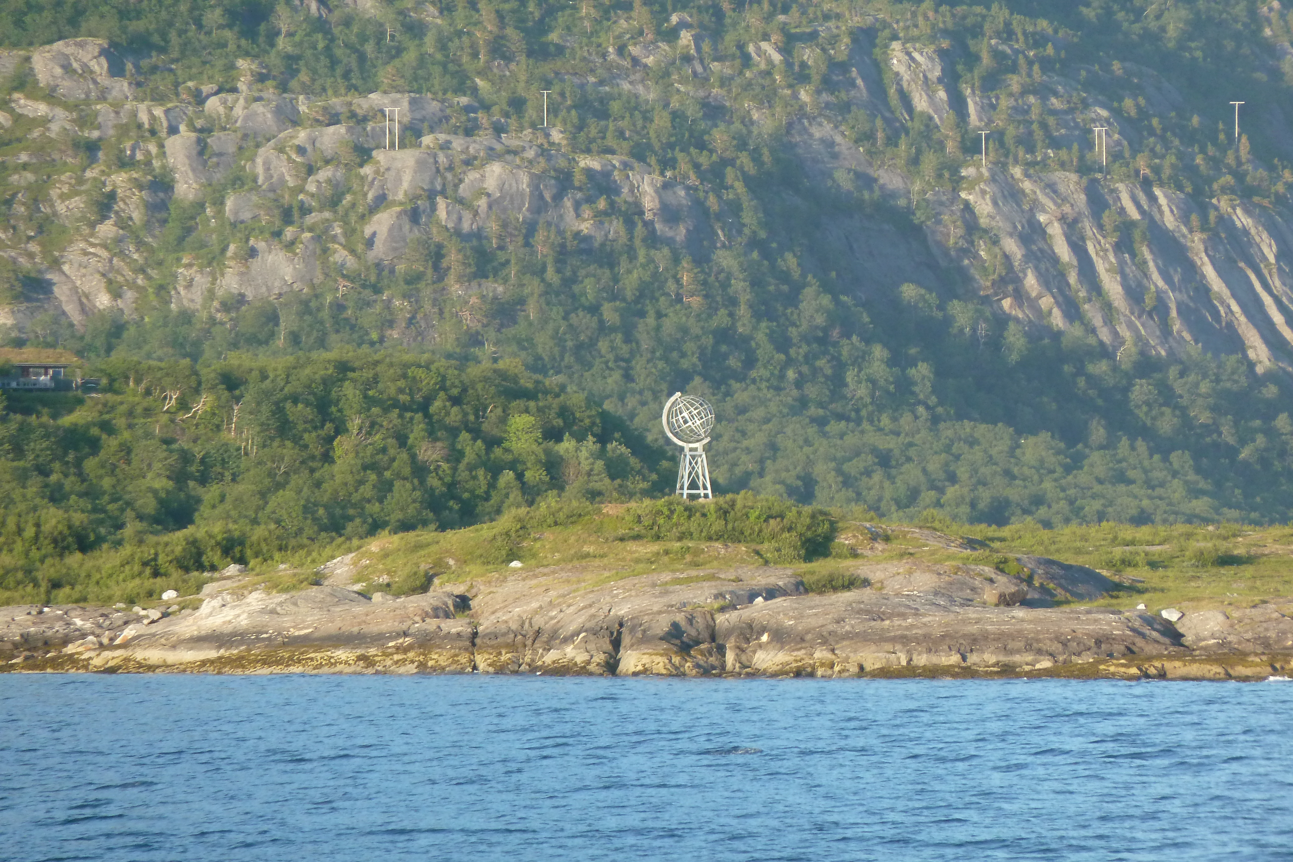 Polarsirkelen, sett fra ferga mellom Jektvik og Kilboghavn.